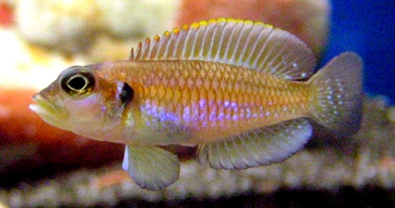 Adult Lamprologus ocellatus